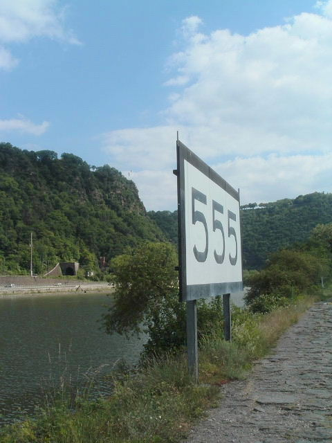 Rheinkilometer 555 bei St. GoarshausenEigene Fotografie